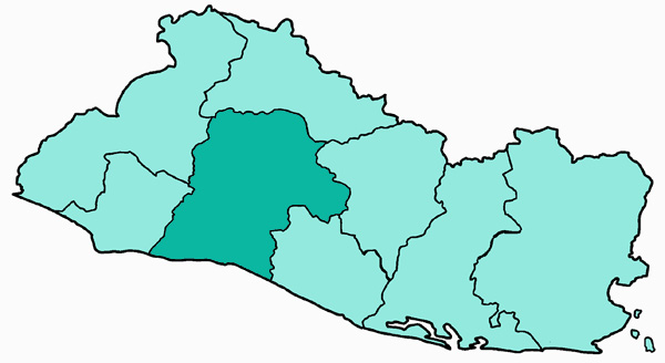 Mappa dell'arcidiocesi cattolica di San Salvador, in El Salvador. Lavoro personale eseguito a partire da questa immagine di Commons. Fonte per i confini delle diocesi: Categoria:Chiesa cattolica in El Salvador